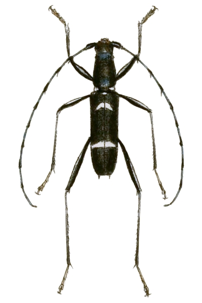 Acrocyrta clytoides